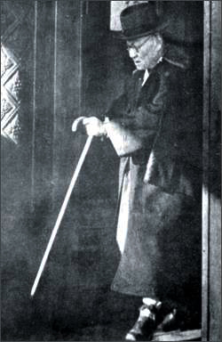 열차에서 하차하는 고하 송진우 (1945. 12)